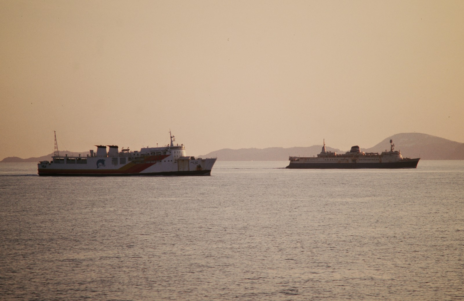 陸奥湾内を航行する東日本フェリー・べらと日本国有鉄道・摩周丸